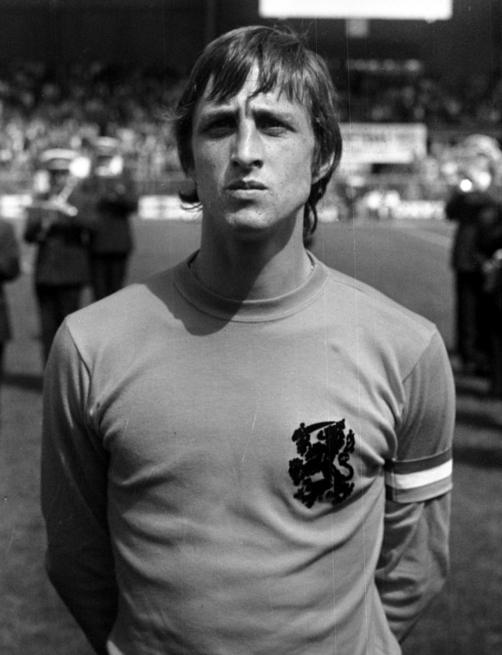 Oefeninterland Nederland tegen Argentinie 4-1; nr. 6, 7 Cruyff, kop